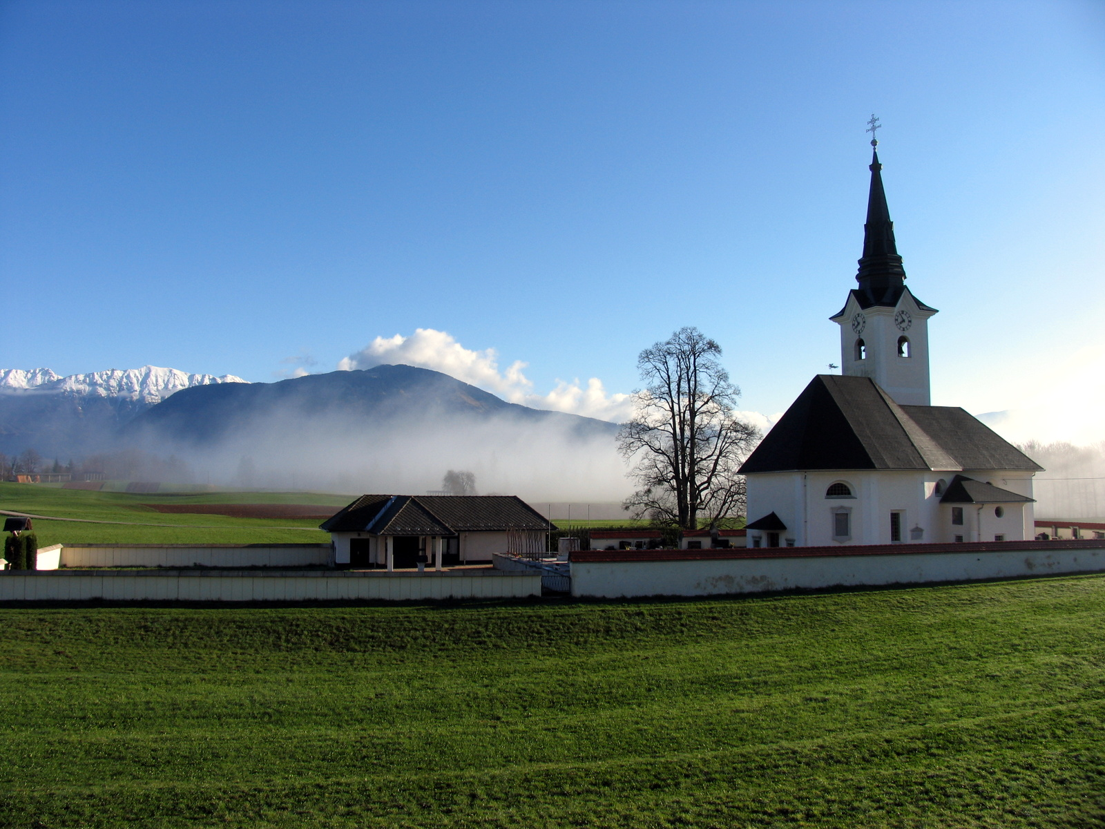 Cerkev Svetega Križa